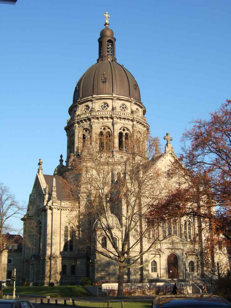 Christuskirche Mainz vom Westen aus betrachtet